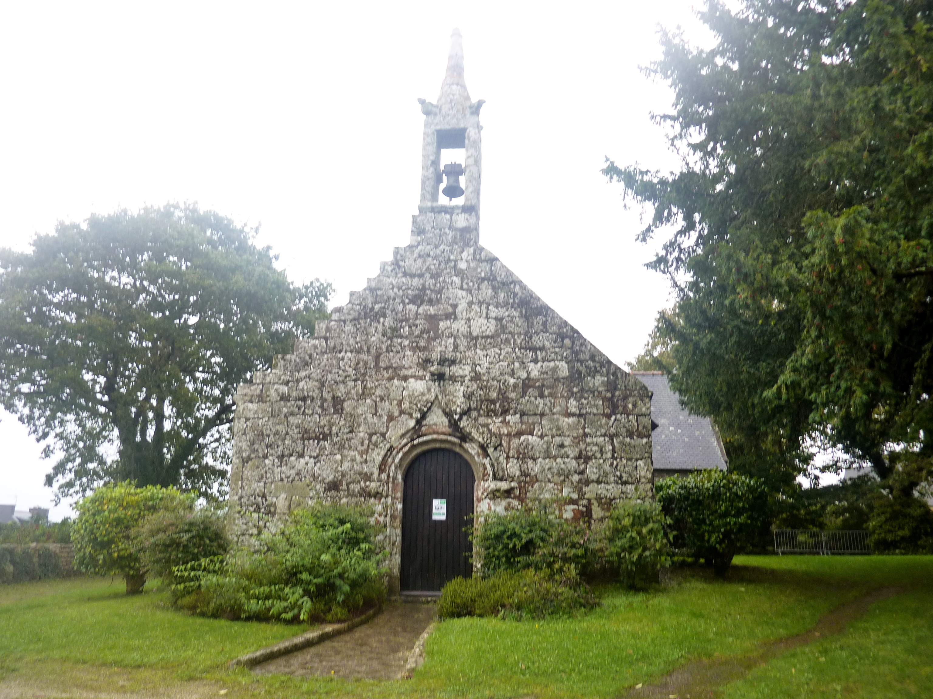 Rosporden : la chapelle Saint-Éloi [en fait saint Alar ou saint Alor, qui fut évêque de Quimper) ; elle date de la fin du XVIe ou du début du XVIIe siècle.